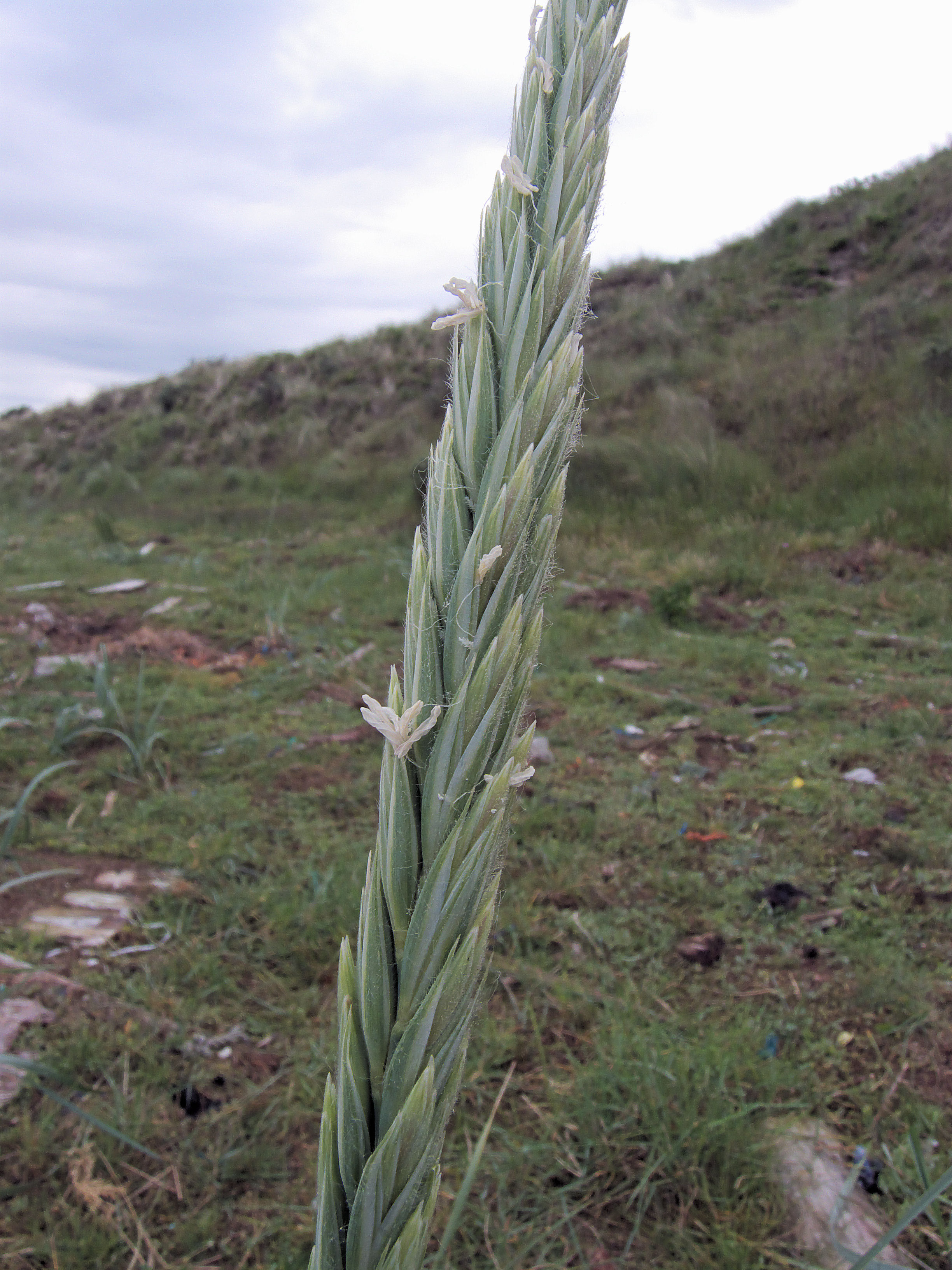 Leymus arenarius (zandhaver), aar